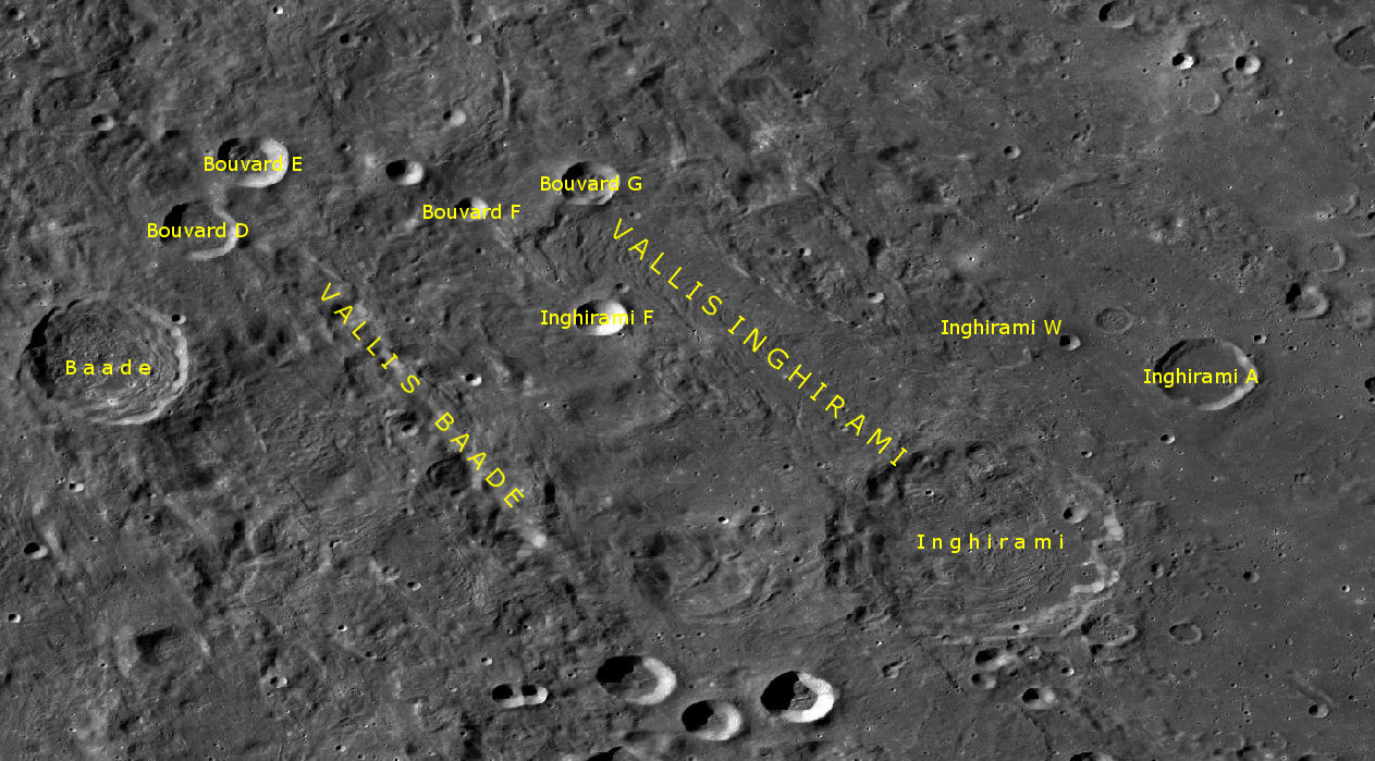 Vallis Inghirami. (Imagen LRO)